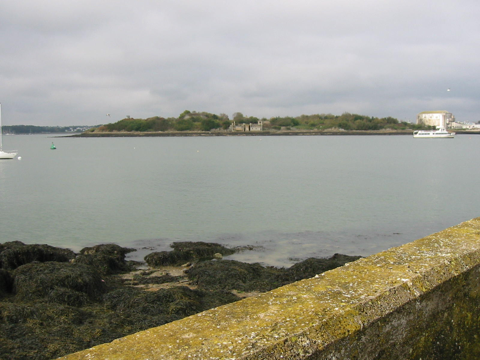 Vue sur l'île Saint-Michel [commune de Lorient], près de Locmiquélic (Bretagne). Photo Mathieu Front